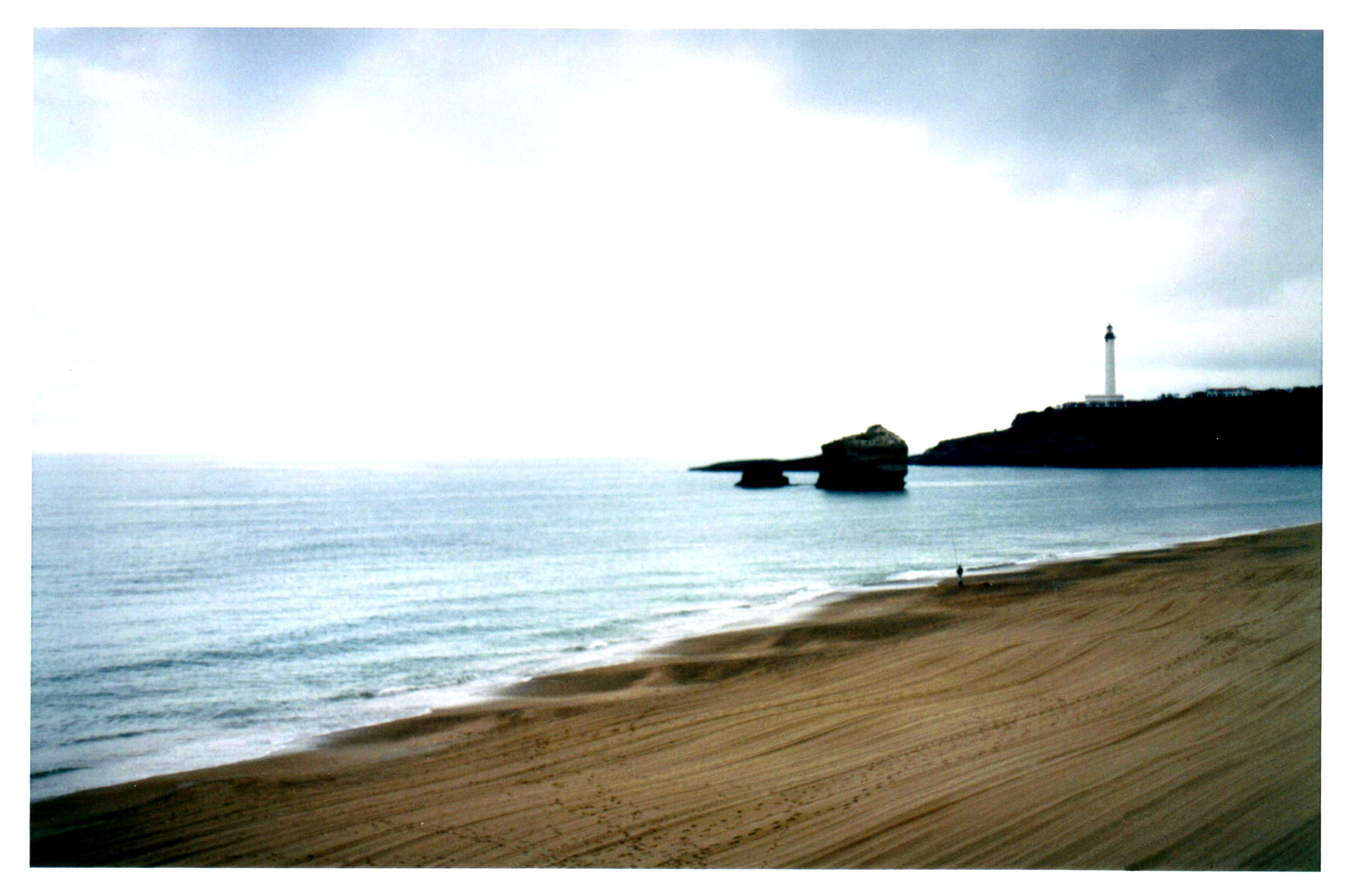 Plage et Phare de Biarritz